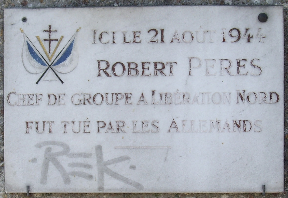 Plaque commémorative, quai du 4-Septembre, Boulogne-Billancourt, à l'entrée du pont de Saint-Cloud. « Ici, le 21 août 1944, Robert Pères, chef de groupe à Libération Nord, fut tué par les Allemands. »